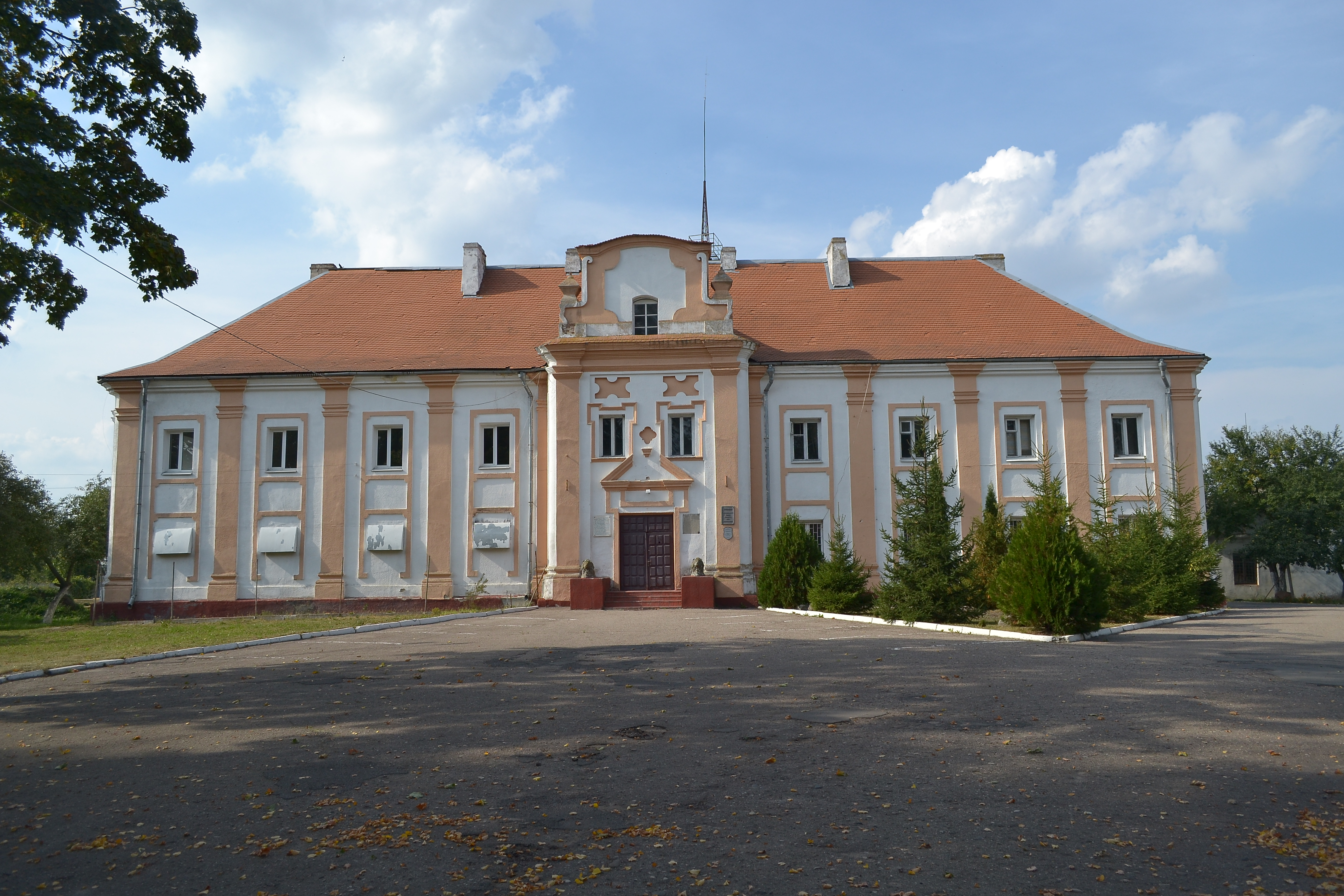 Беларуская (тарашкевіца): Будынак былога Спаскага манастыра(ru). г. Кобрынь This is a photo of Belarusian heritage monument. Reference number: 112Г000386 ( WLM)